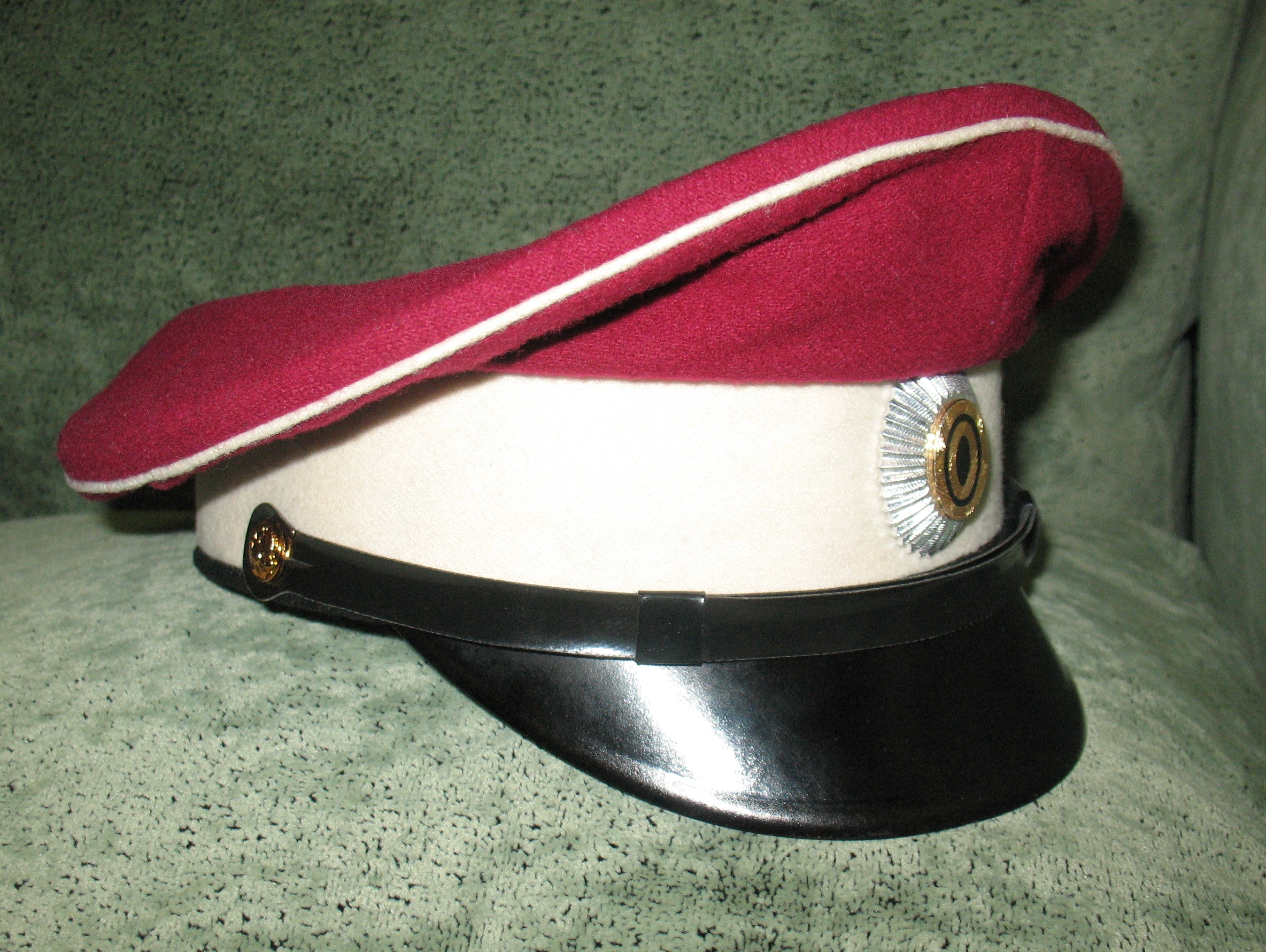 Фуражка добровольца дроздовских частей времён Гражданской войны. Реконструкция 2010 года, идентичная оригиналу.